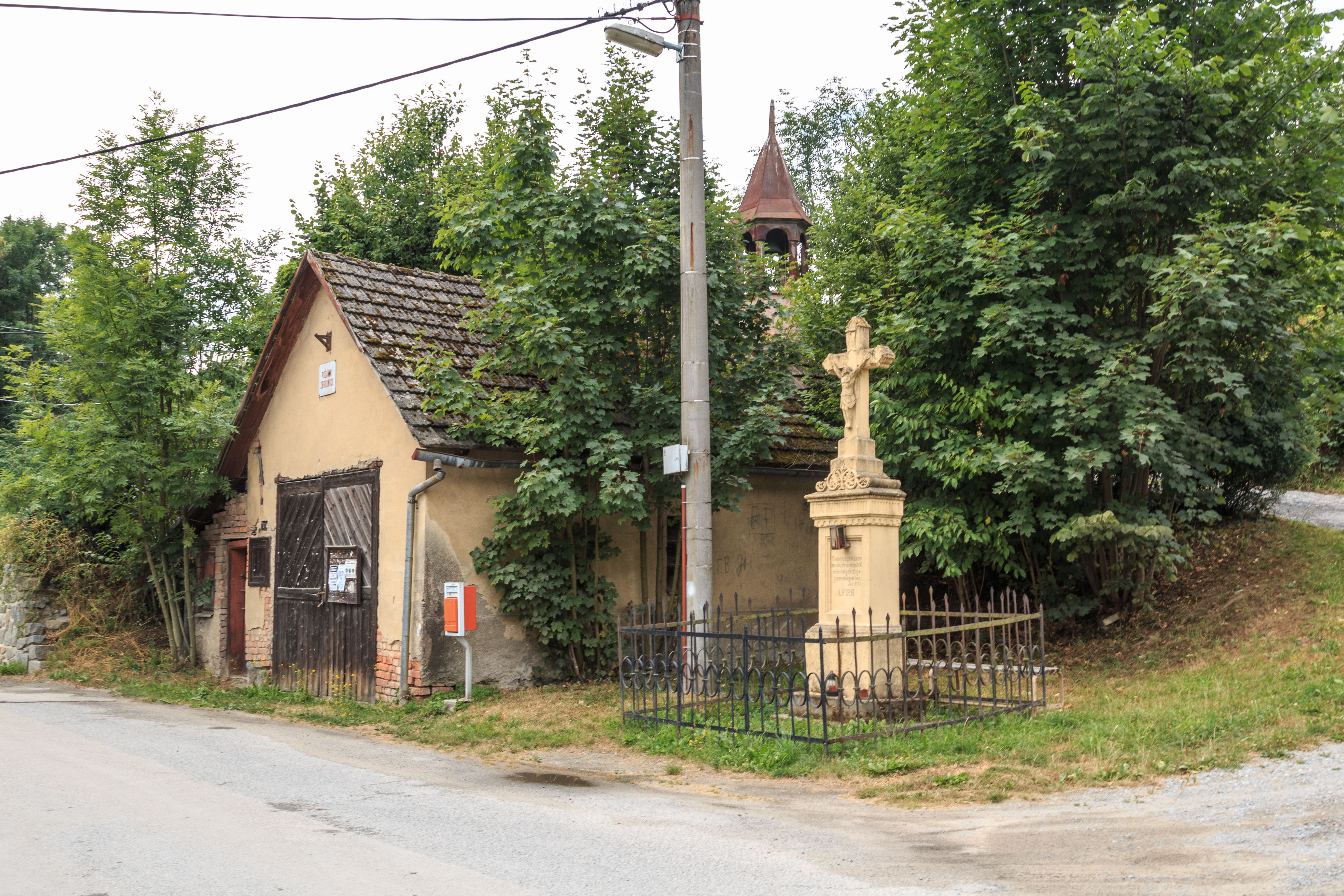 Cejřov hasičská zbrojnice